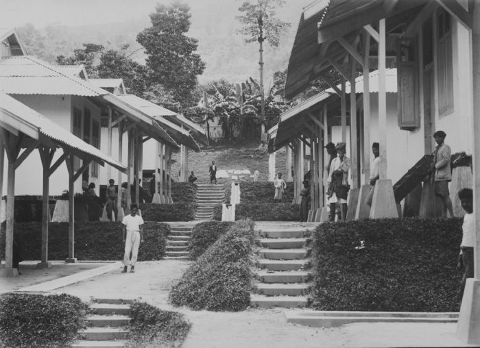 foto. Arbeiders uit de mijnen bij Sawahloentoe voor gemeenschappelijke huizen